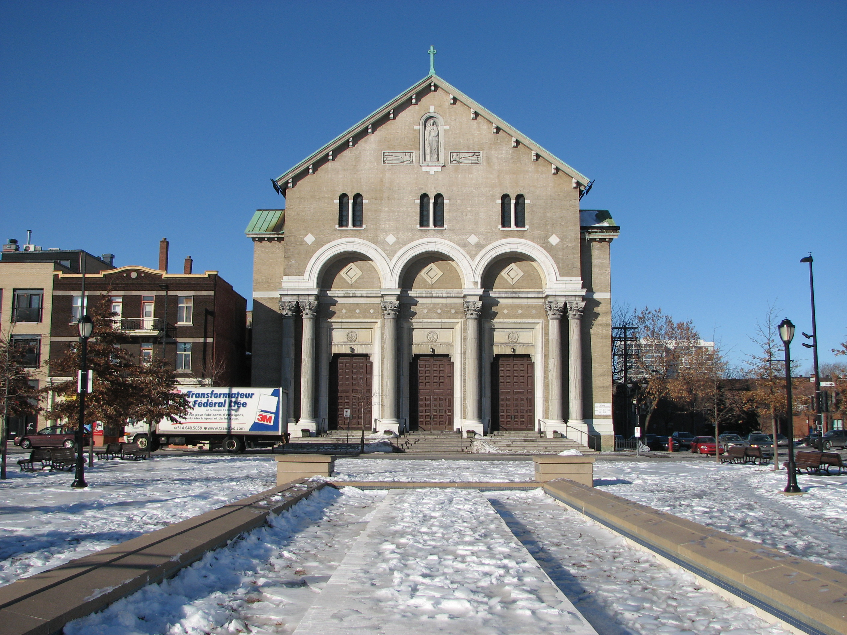 Église Ste Marie-Marguerite-Alacoque, à Montréal. Œuvre d'Ernest Cormier.